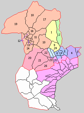 神奈川県足柄上郡の町村。